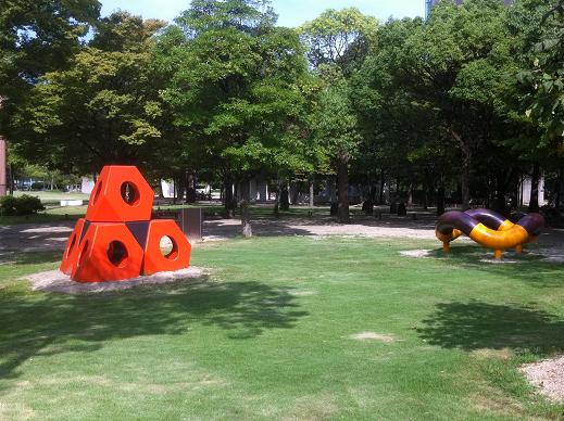 PLAY SCULPTURE＆OCTETRA 高松市立中央公園内にあるイサム・ノグチの遊具